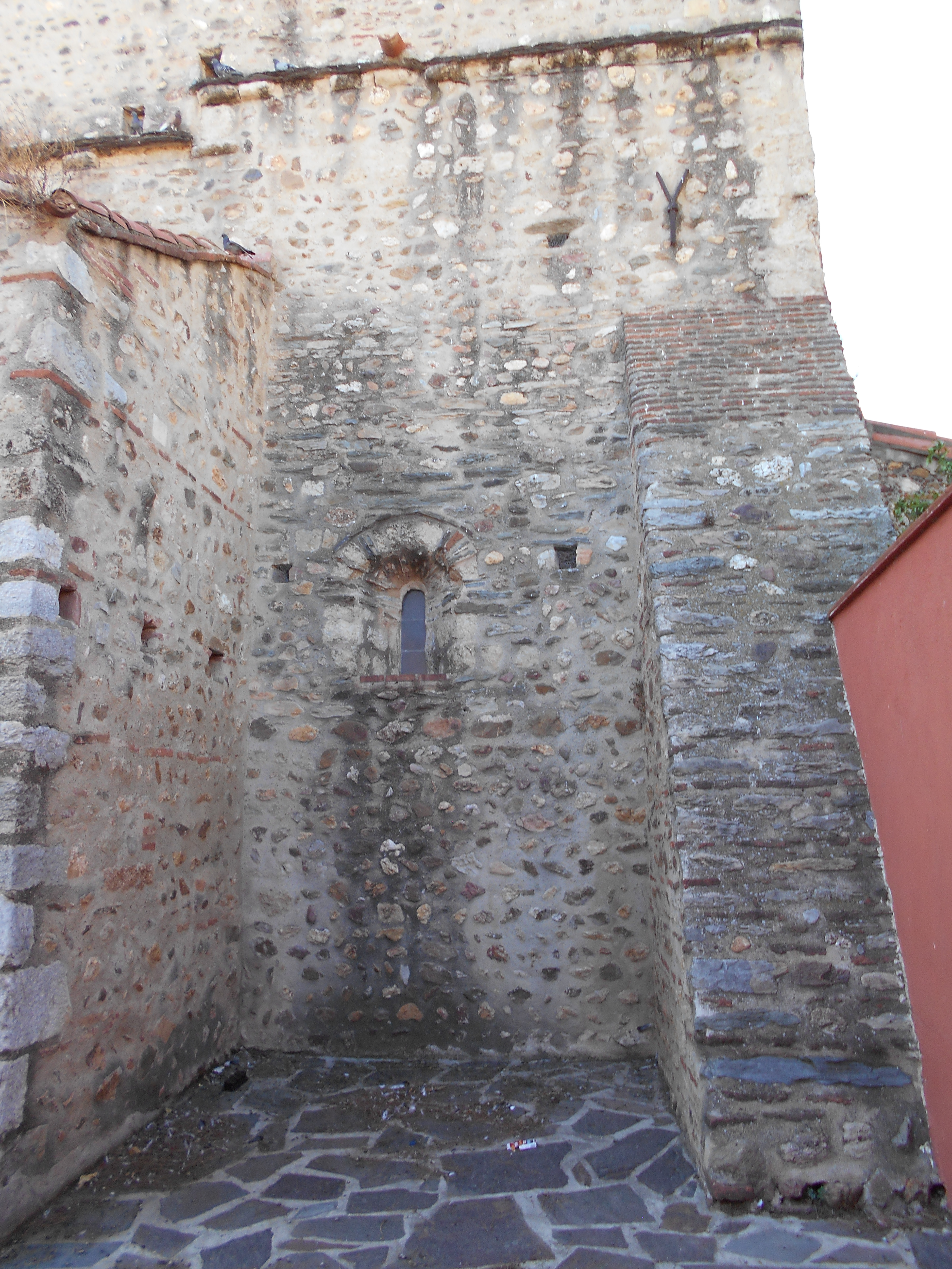 Fragment romànic de Sant Tomàs de Llupià